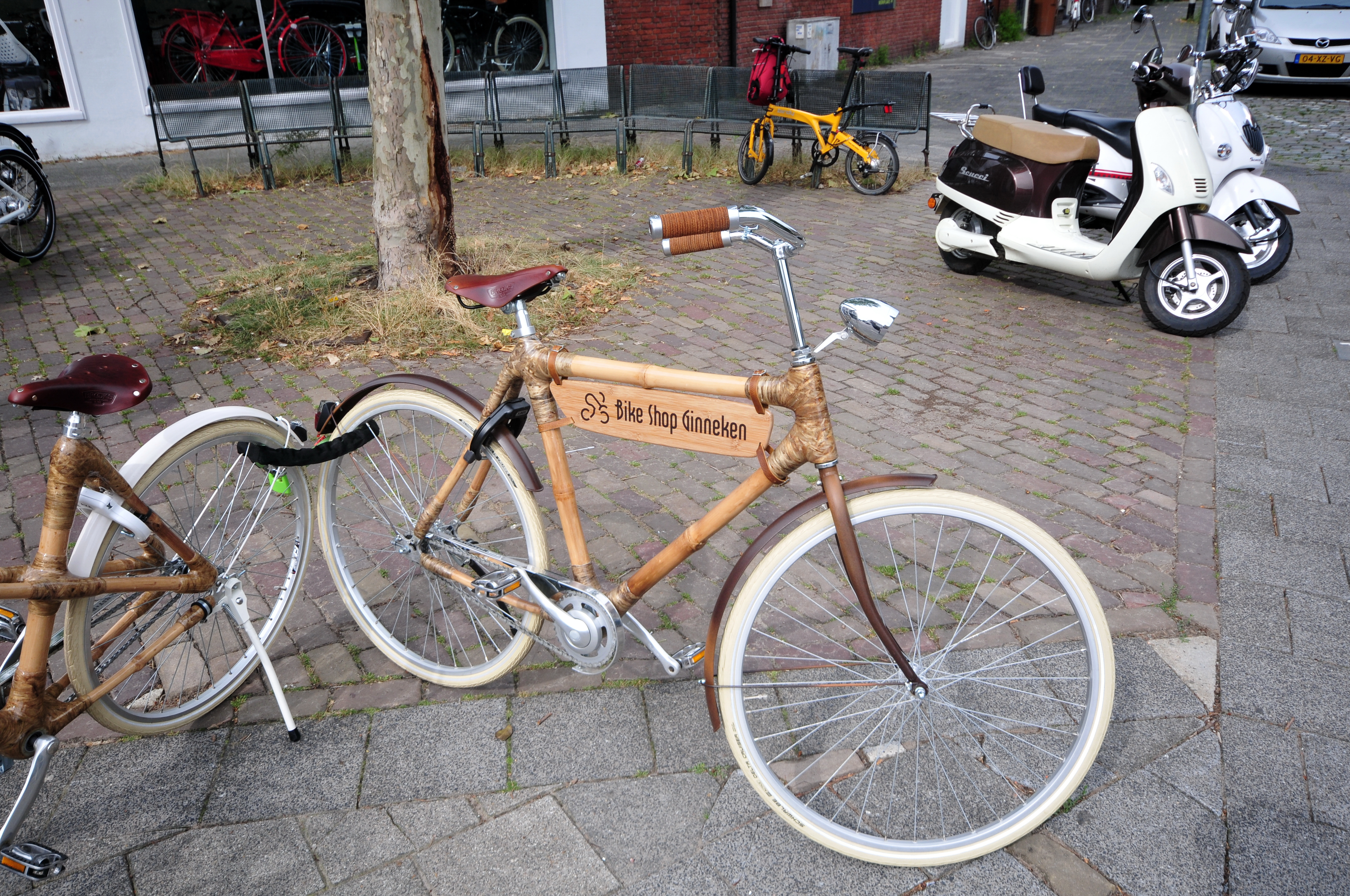 Breda, Niederlande, 2013